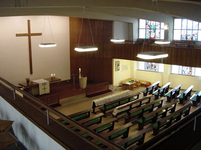 Pauluskirche Innenansicht Sonstiges: Dieses Foto wurde von mir gemacht und zur allgemeinen Verwendung freigegeben (public domain).